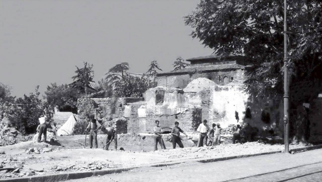 İbrahim Paşa Hamamı 1494 yılında yapılmıştır ve Atatürk Bulvarı genişletme çalışmaları sonucu koruma altında olmasına rağmen 1941 yılında yıkımına başlanmış ve 1956 yılına gelindiğinde tamamen yıkılmıştır.